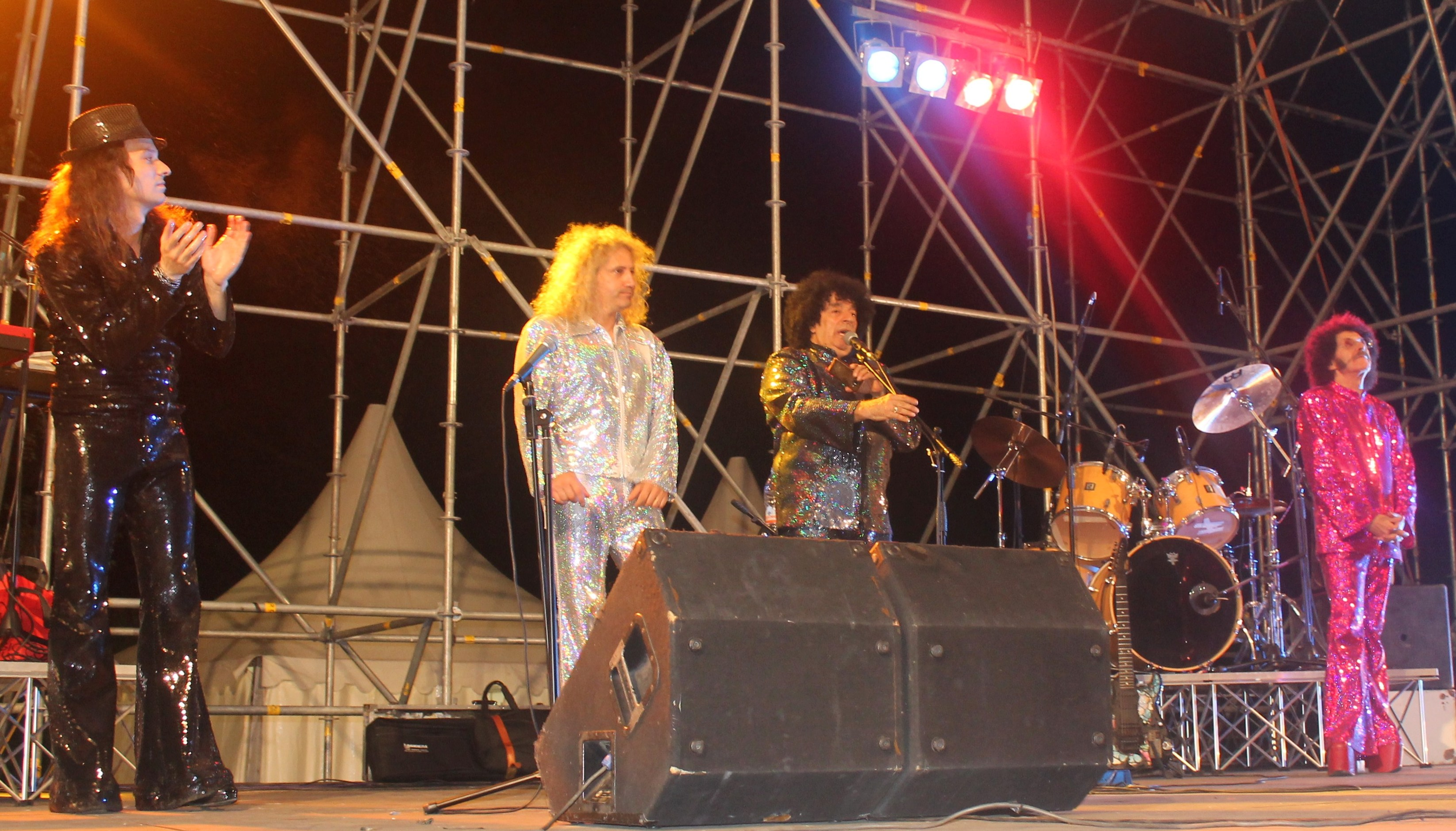 foto concerto Cerveteri (Rm) agosto 2013